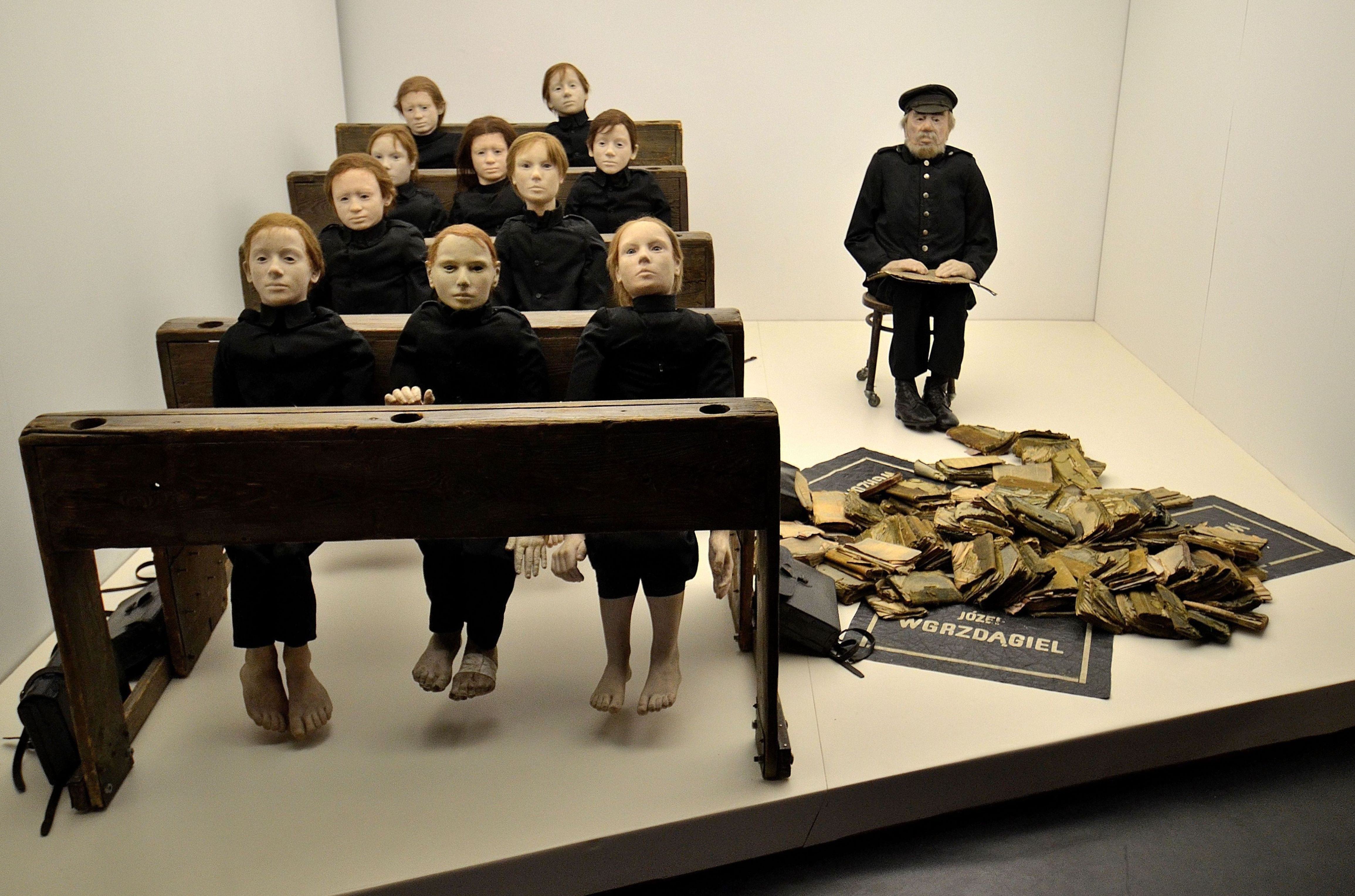 Ławki szkolne i manekiny - fragment stałej ekspozycji do spektaklu "Umarła klasa" Tadeusza Kantora (Ośrodek Dokumentacji Sztuki Tadeusza Kantora Cricoteka w Krakowie) na wystawie w Muzeum Literatury im. Adama Mickiewicza w Warszawie